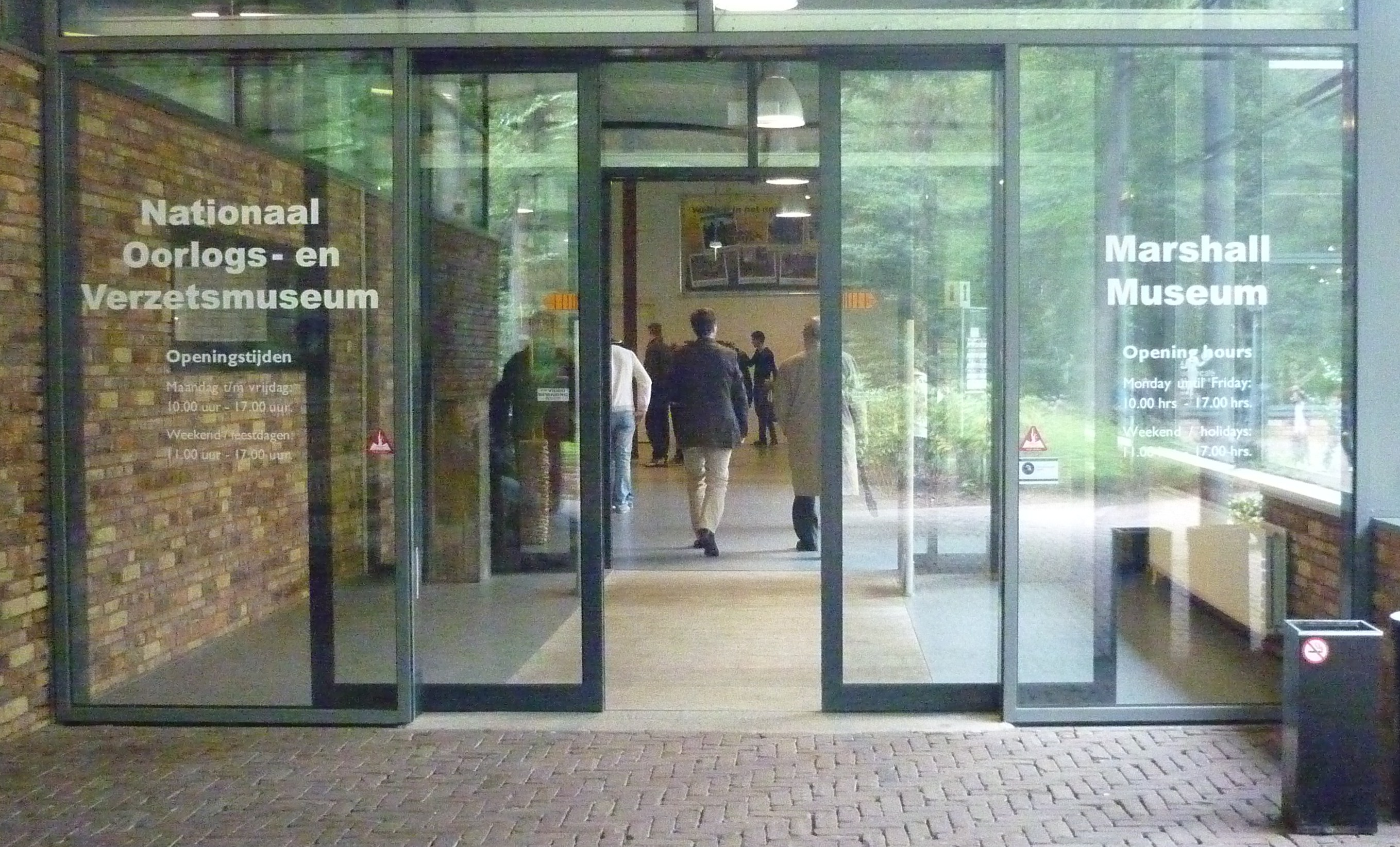 Liberty Park Overloon, entree Oorlogsmuseum